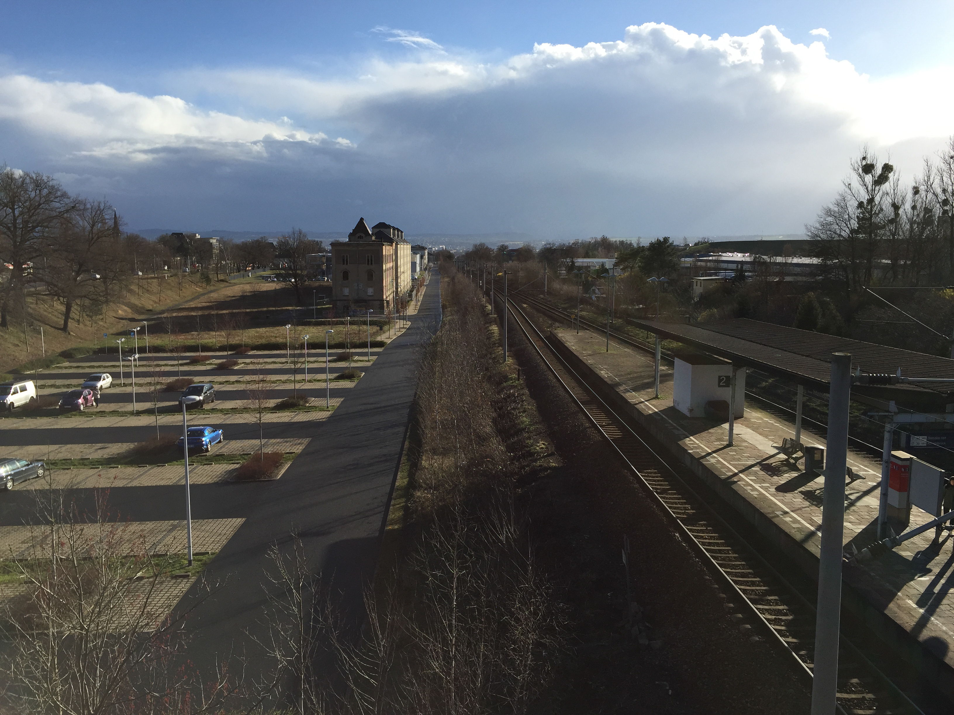 Bahnsteiganlagen des Haltepunkts Dresden Industriegelände, Blick Richtung Süden. Östlich davon (im Bild links) die Fläche der ehemaligen Industriebahn Albertstadt, heute mit einem Parkplatz überbaut.